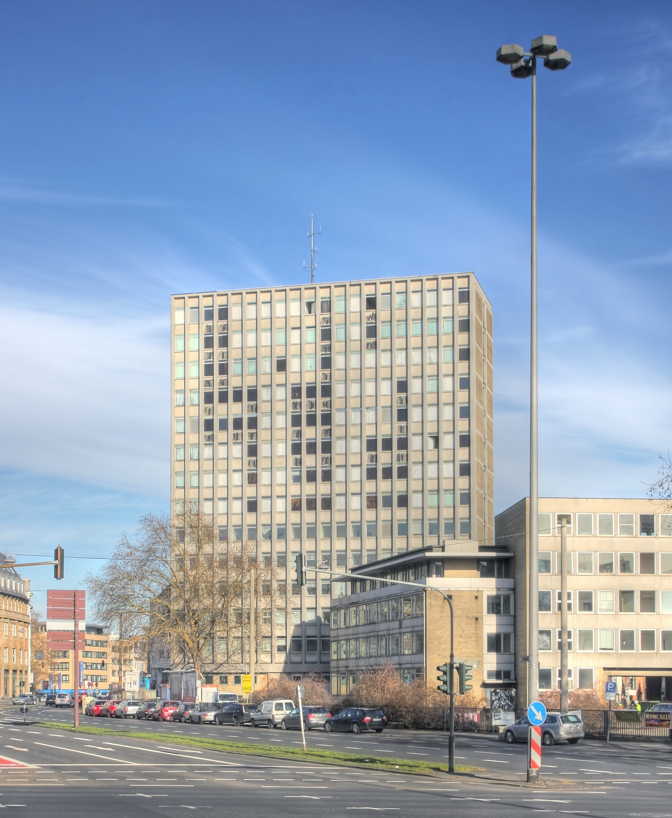 Ehemaliges Polizeipräsidium, Waidmarkt, Köln. Ansicht vom Blaubach. Architekt: Eugen Blanck, Baujahr: 1953/60